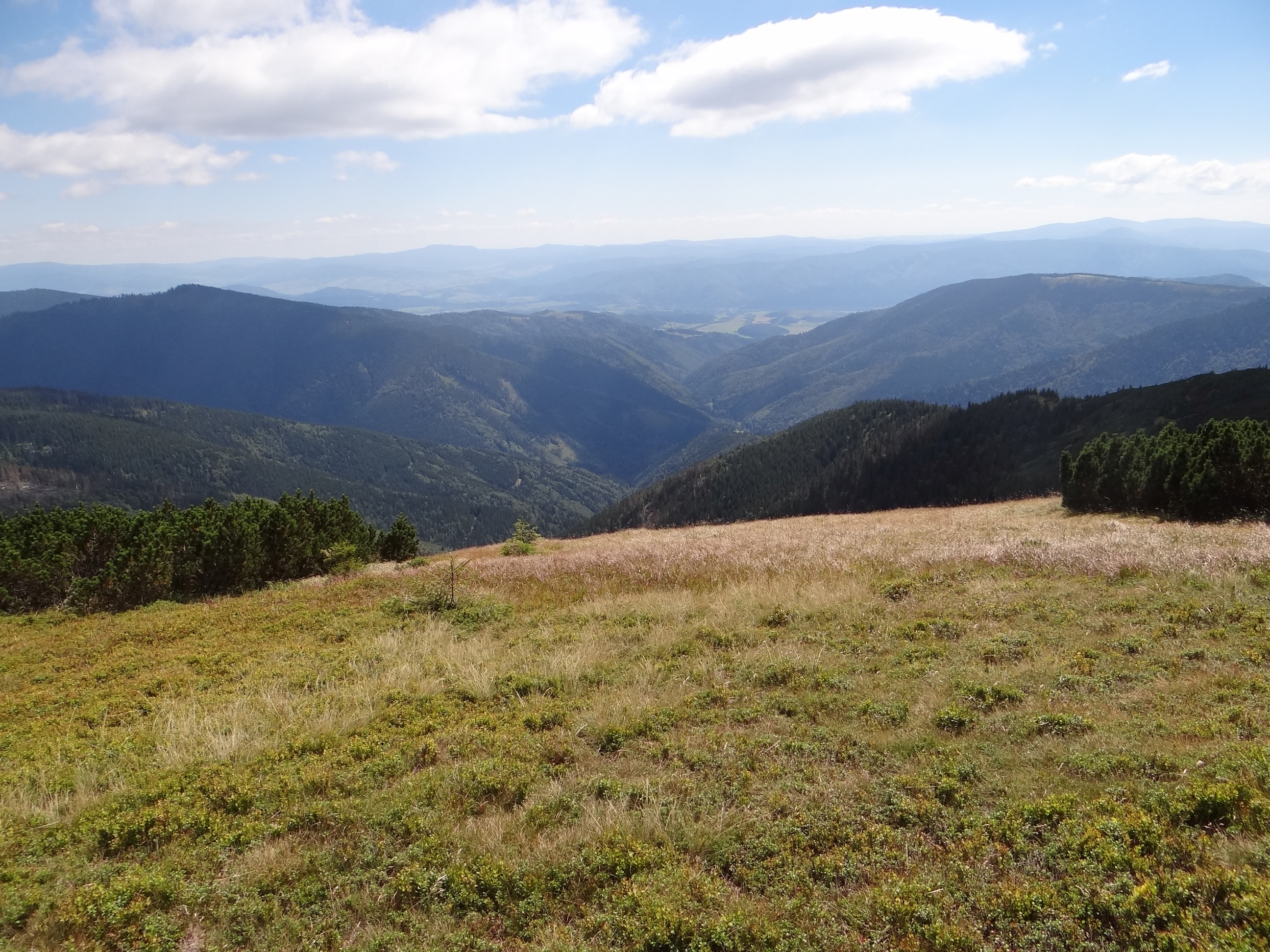 Jasenianska dolina